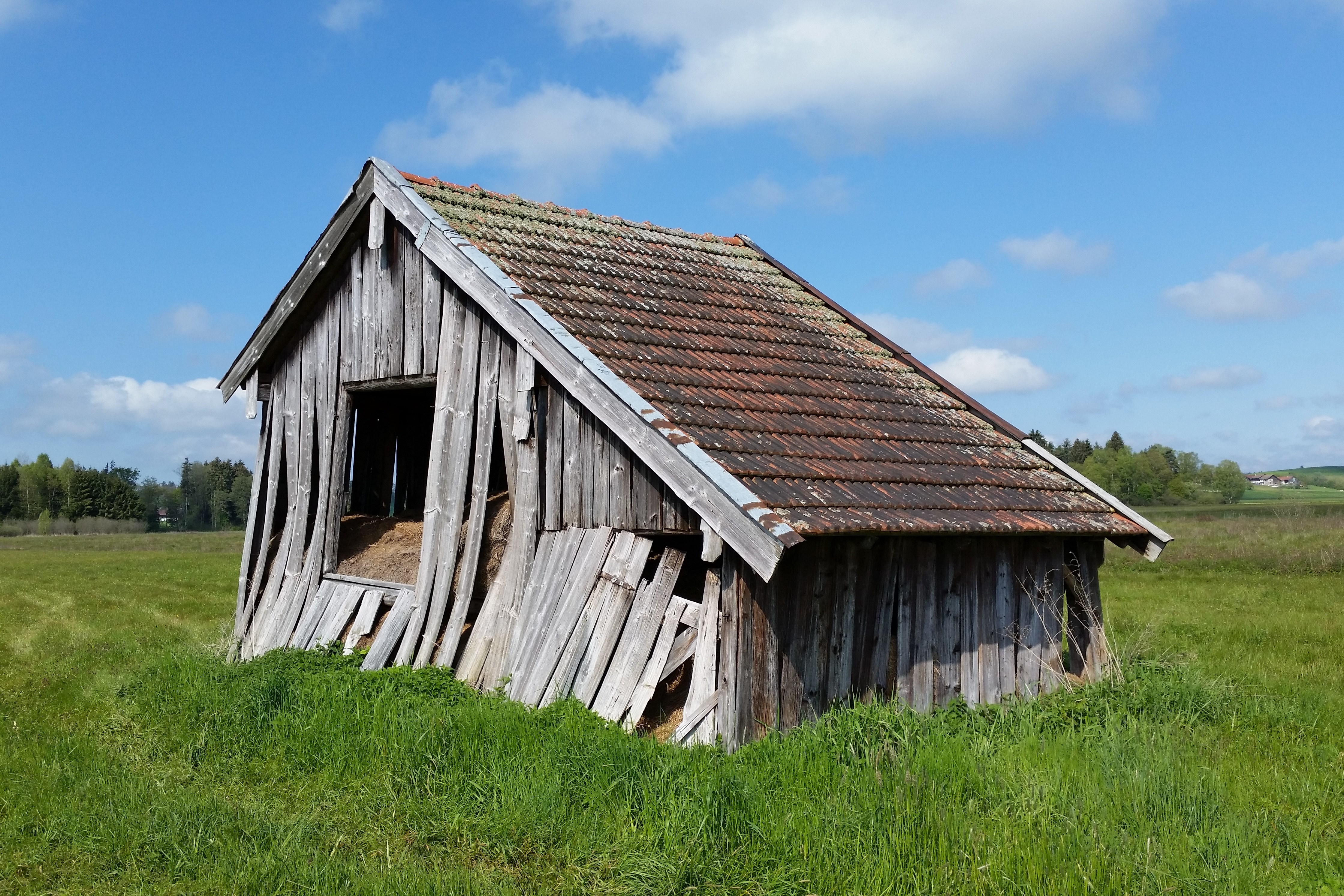 FFH-Gebiet und EU-Vogelschutzgebiet Haarmoos (8043-371).